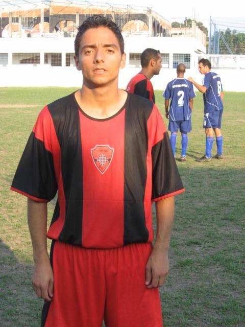 Atleta do Rubro Social EC